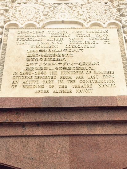 ナボイ劇場横にある日本兵の仕事ぶりを称えるプレート